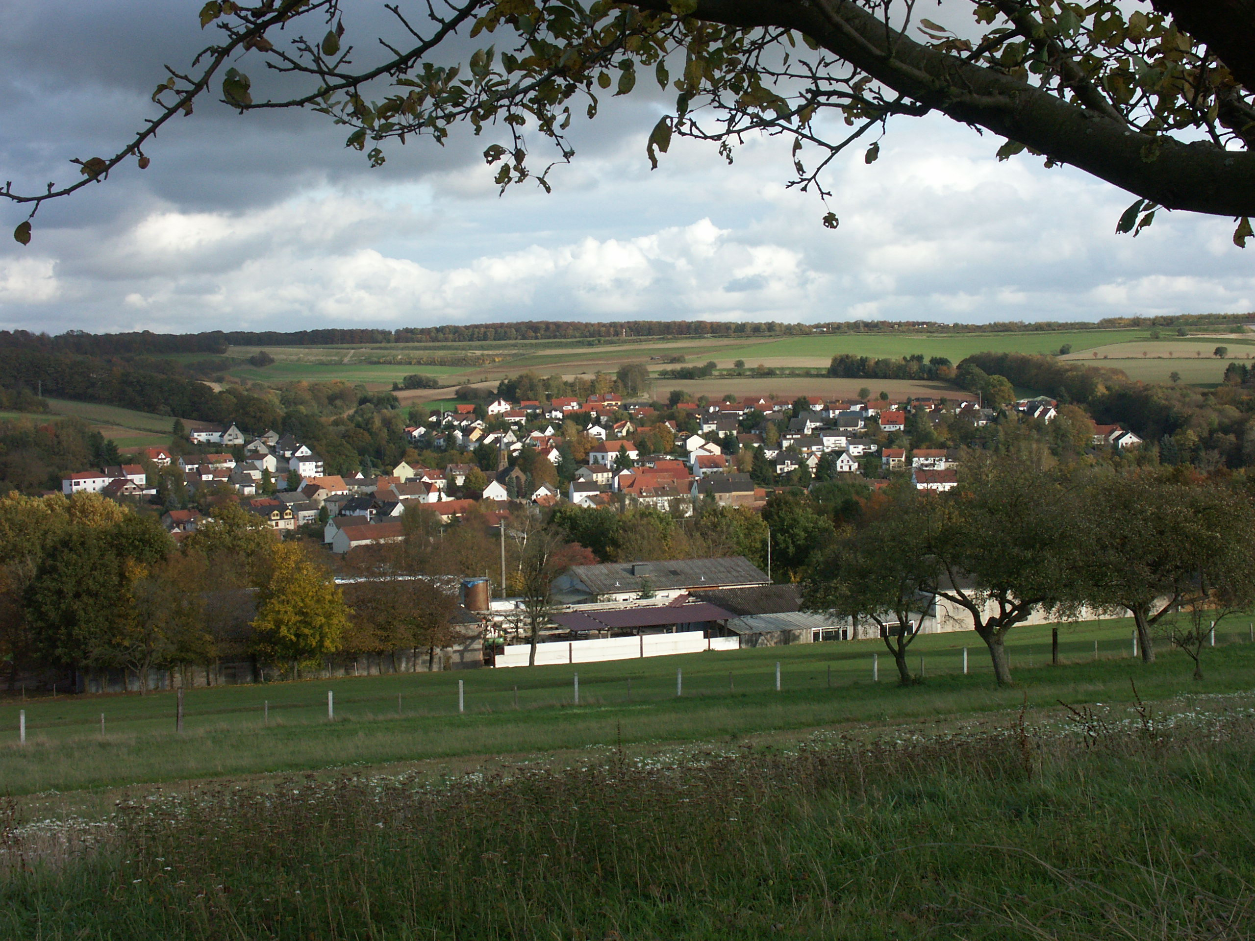 Althornbach Überblick